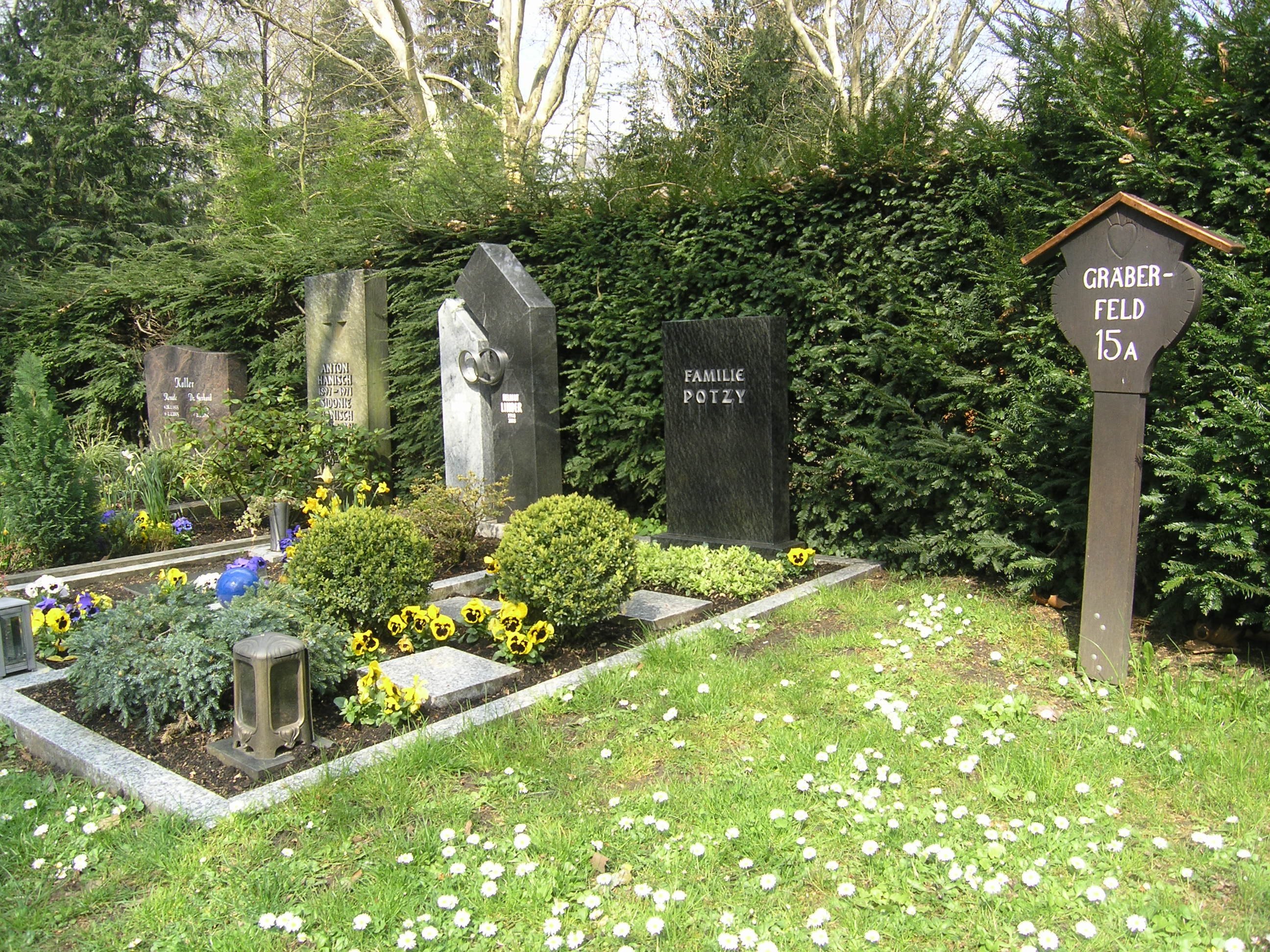 Gräberfeld 15A auf dem Hauptfriedhof Karlsruhe